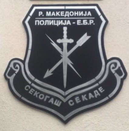 Амлем на Единицата за брзо распоредување